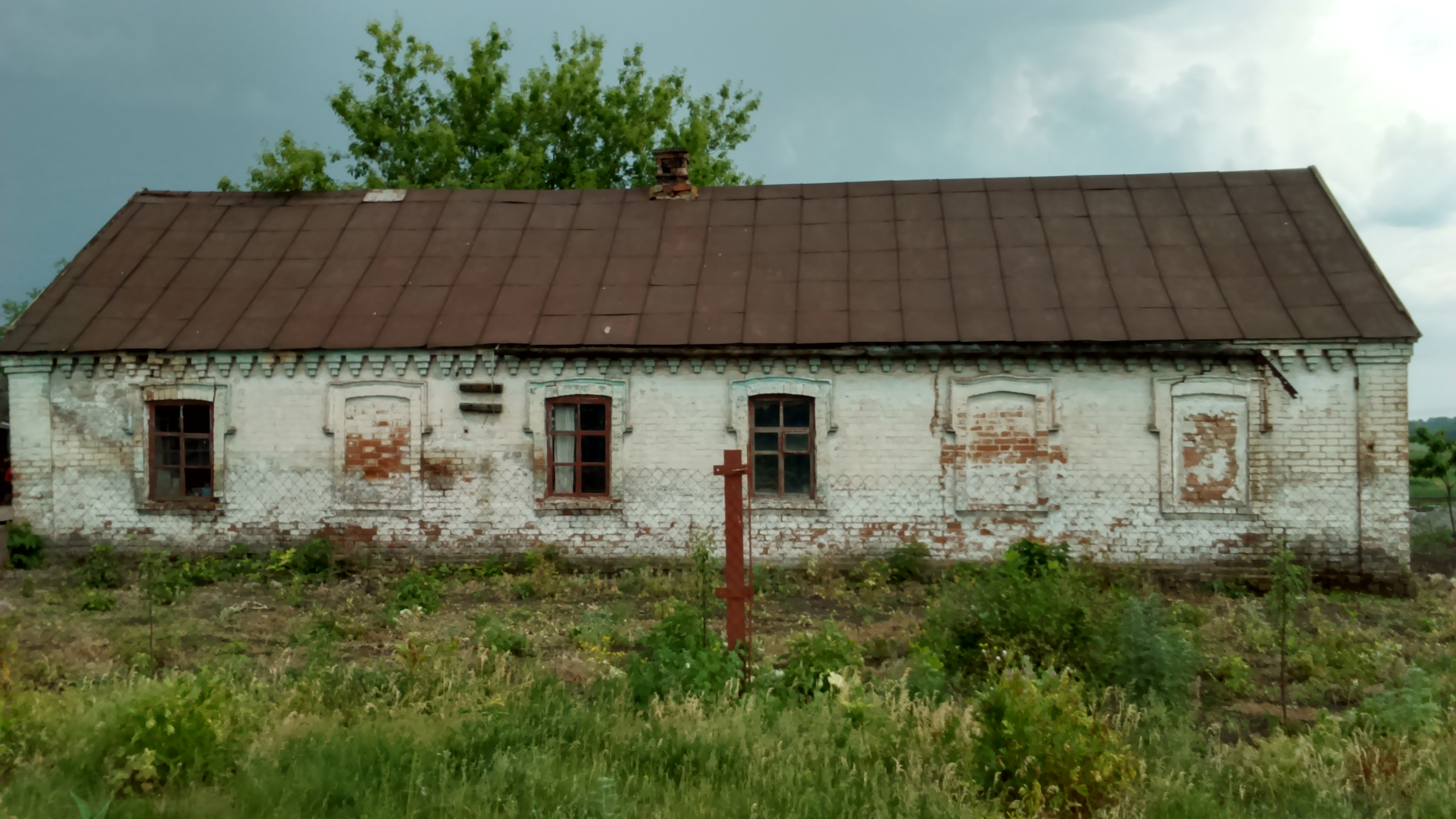 Будинок німецьких колоністів Ро́зи Люксембу́рг Добропільський район.